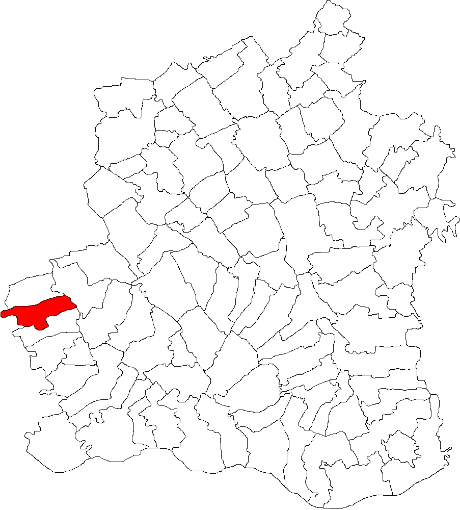 Categorie:Hărţi ale judeţului Teleorman